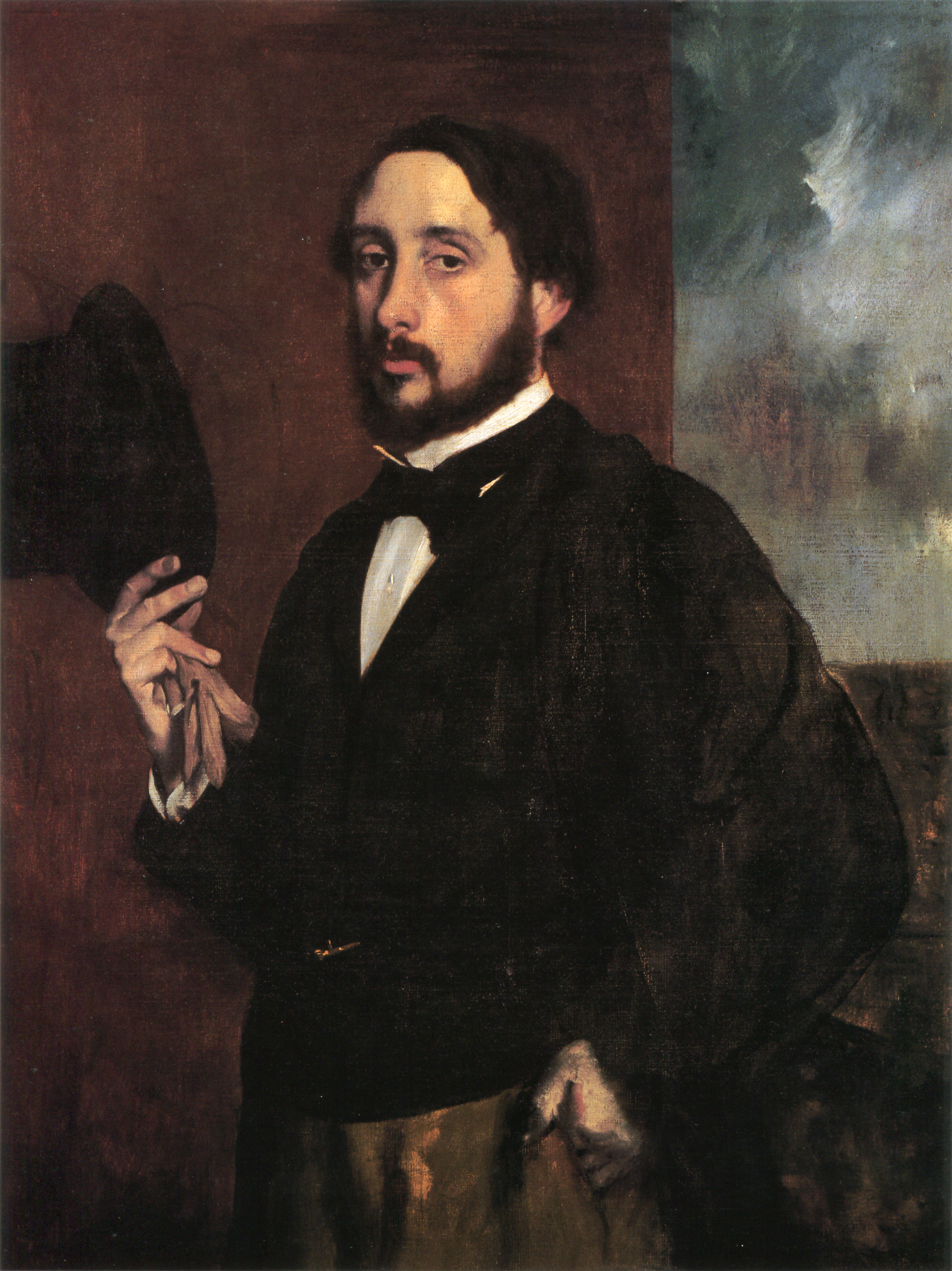 Self-portrait